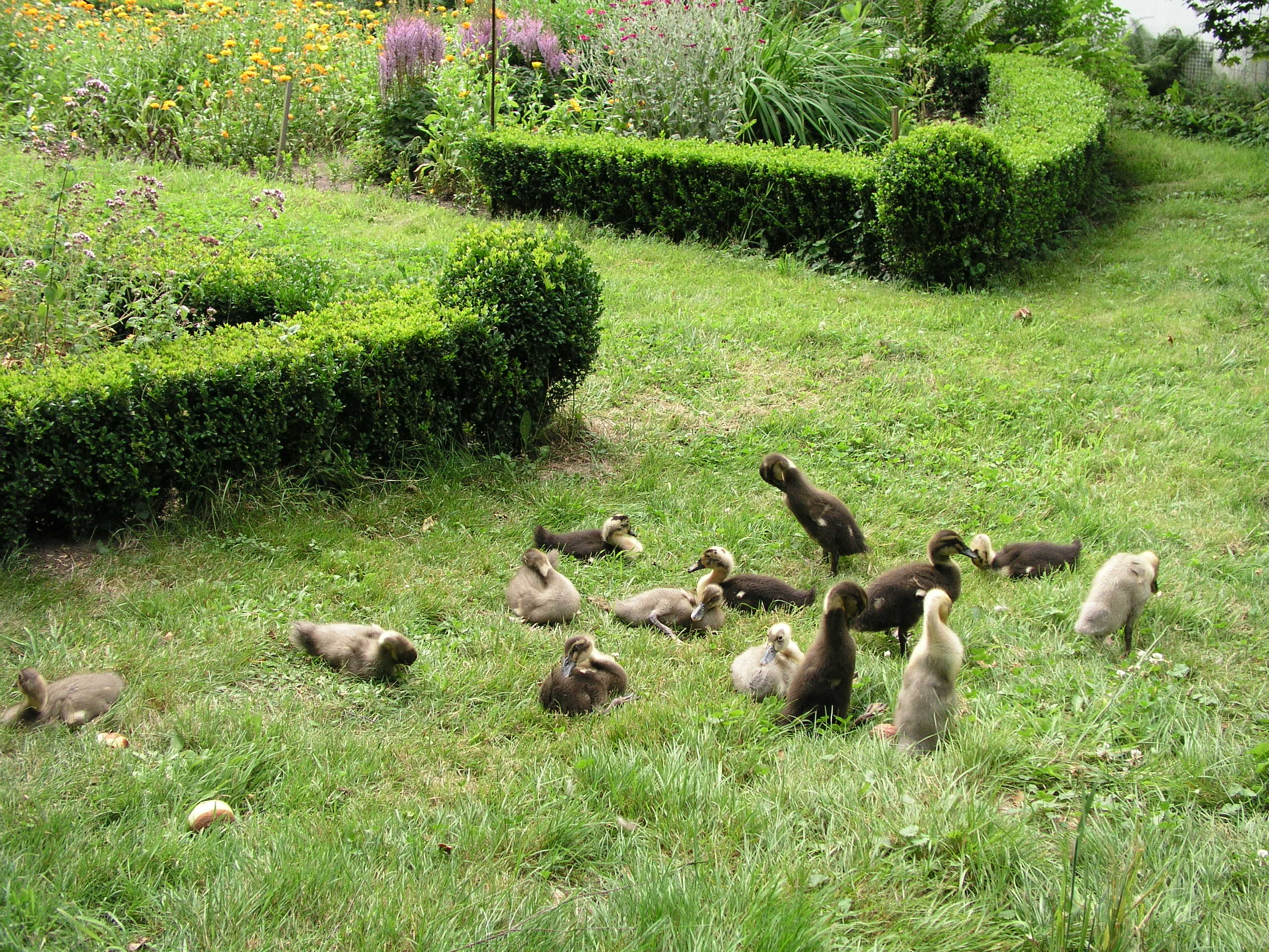 Laufenten im Garten, eine Brut, 2 Woche alt (Anas platyrhynchos f. domestica)